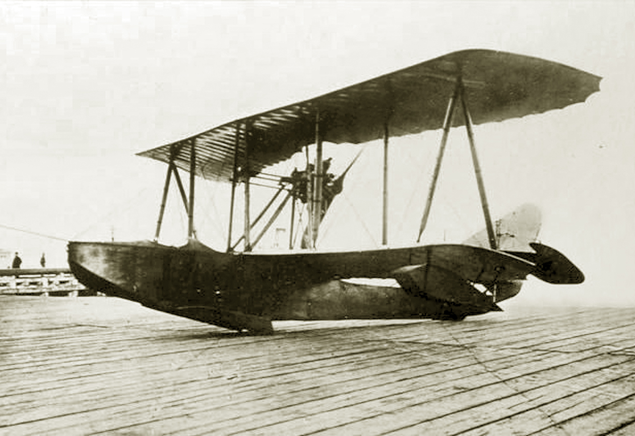 Летающая лодка Седельникова М-10 Баку, 1916 г.